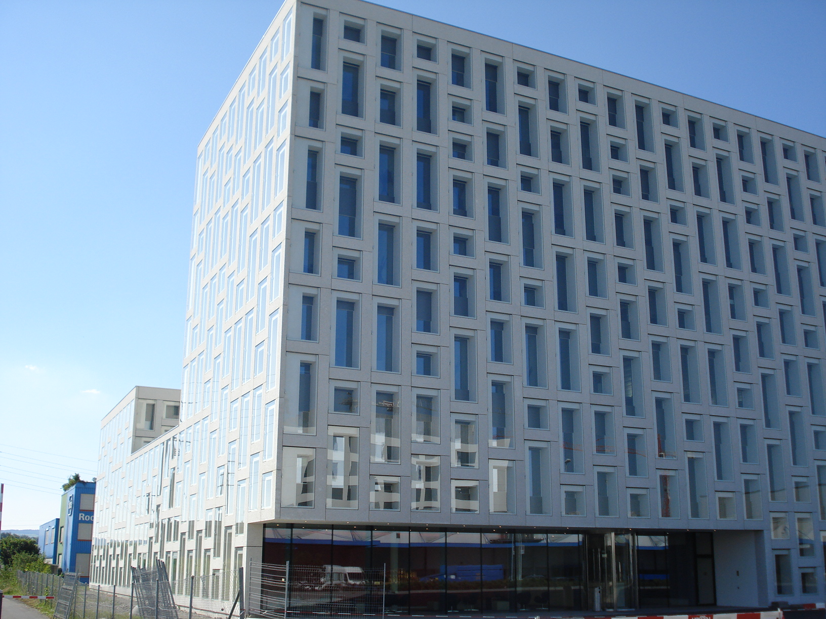 Roche Diagnostics Head Quater - Areal in Rotkreuz